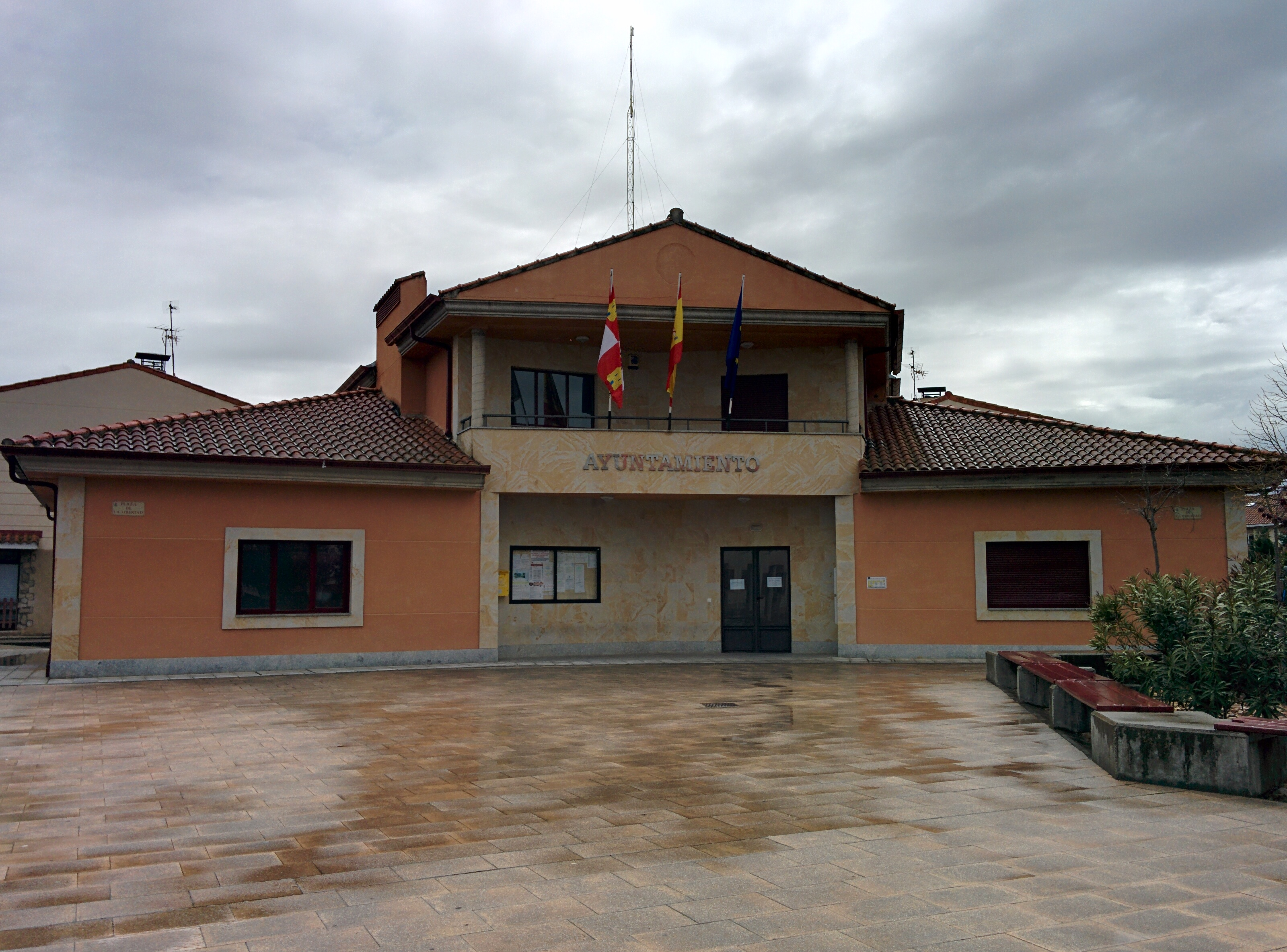 Casa consistorial de Monterrubio de Armuña (Salamanca, España).